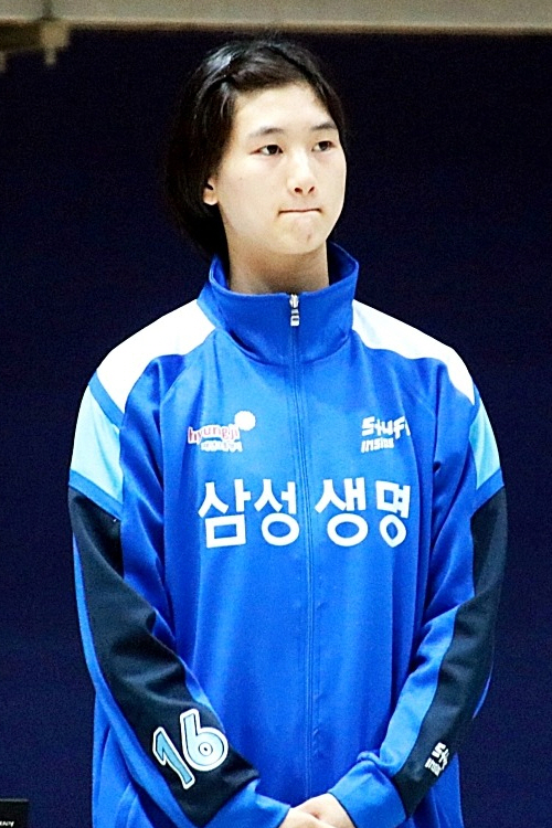 160110 여자농구 신한은행 vs 삼성생명 직찍 1